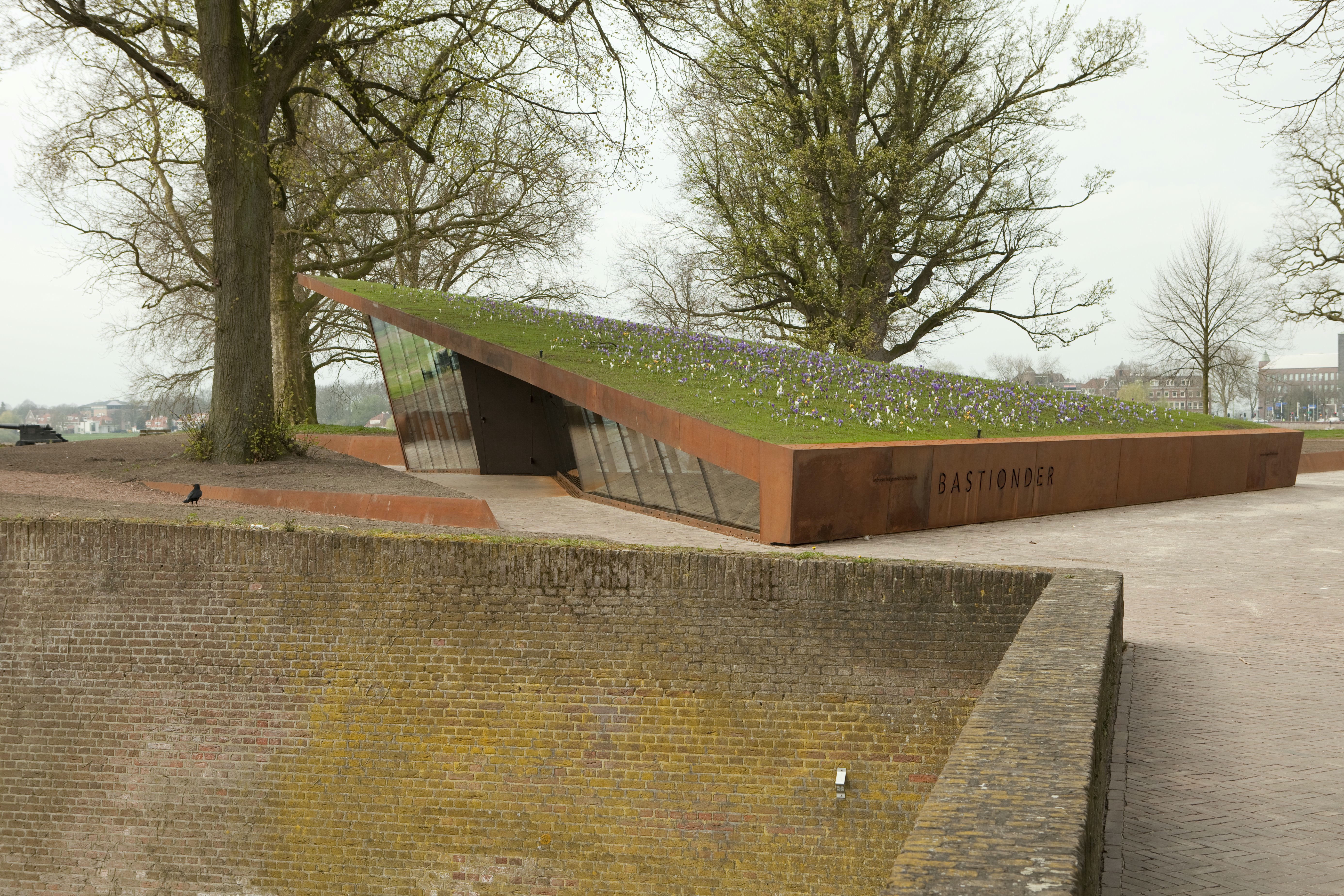 Zicht op een deel van het ondergrondse informatiecentrum Bastion: Overzicht van het bastion, gezien vanaf de Zuidwal